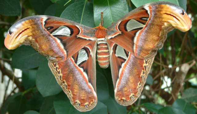 eigen werk, vlindertuin, noorderdierenpark, emmen